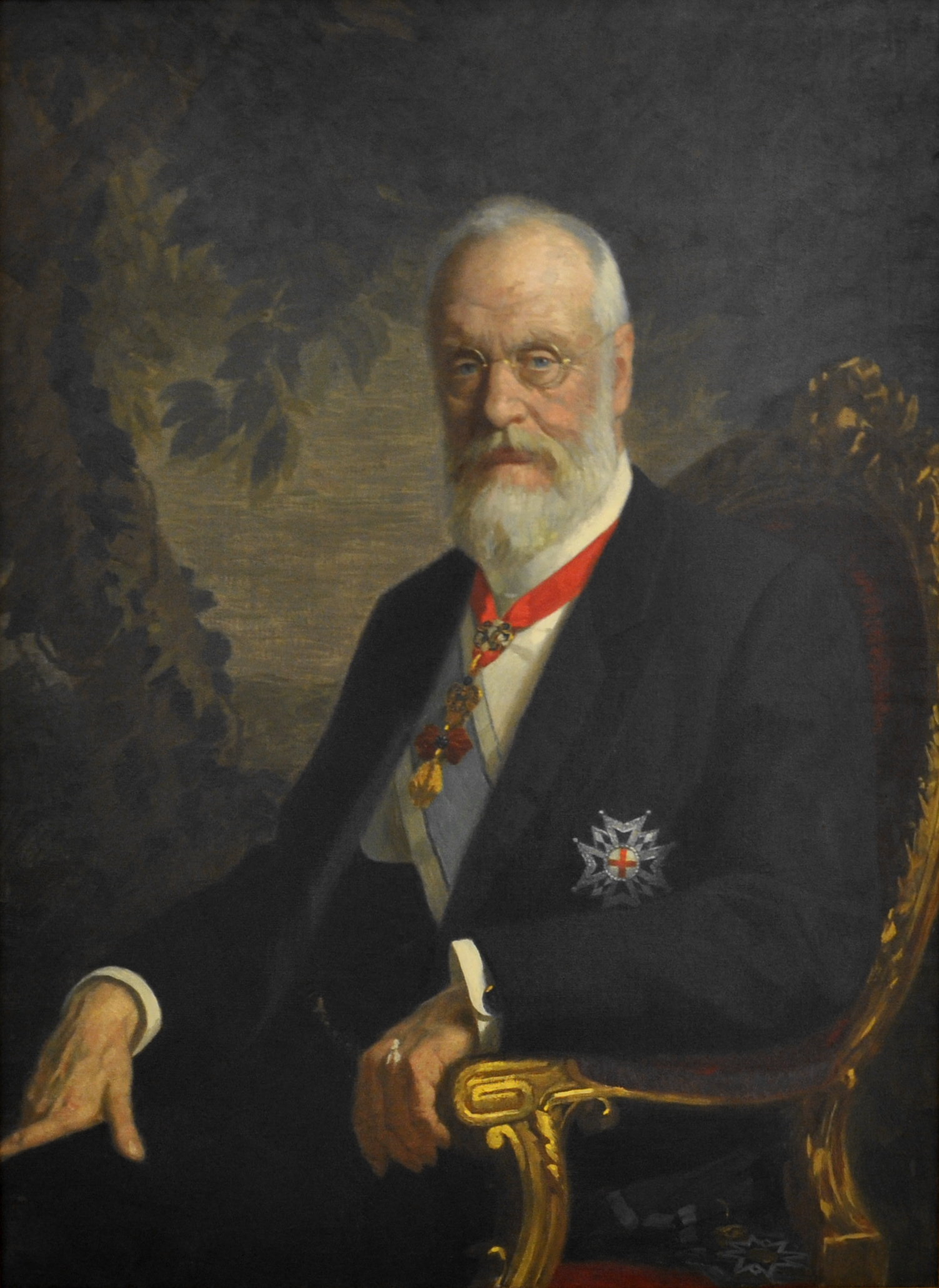 Porträt König Ludwig III. von Bayern, um 1917, Stadtverwaltung Altötting